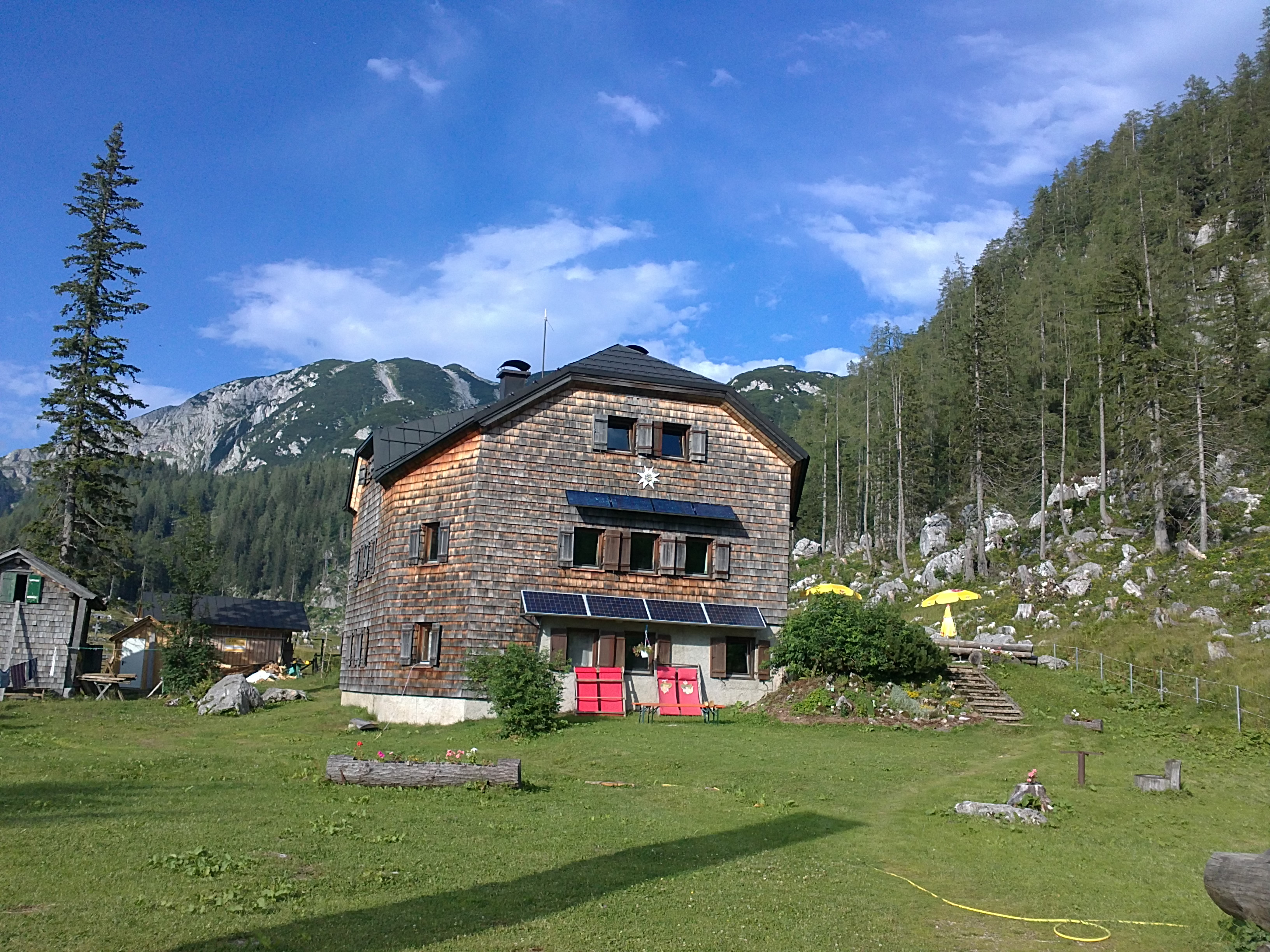 Die Ischler Hütte befindet sich auf der Schwarzenbergalm im Toten Gebirge.